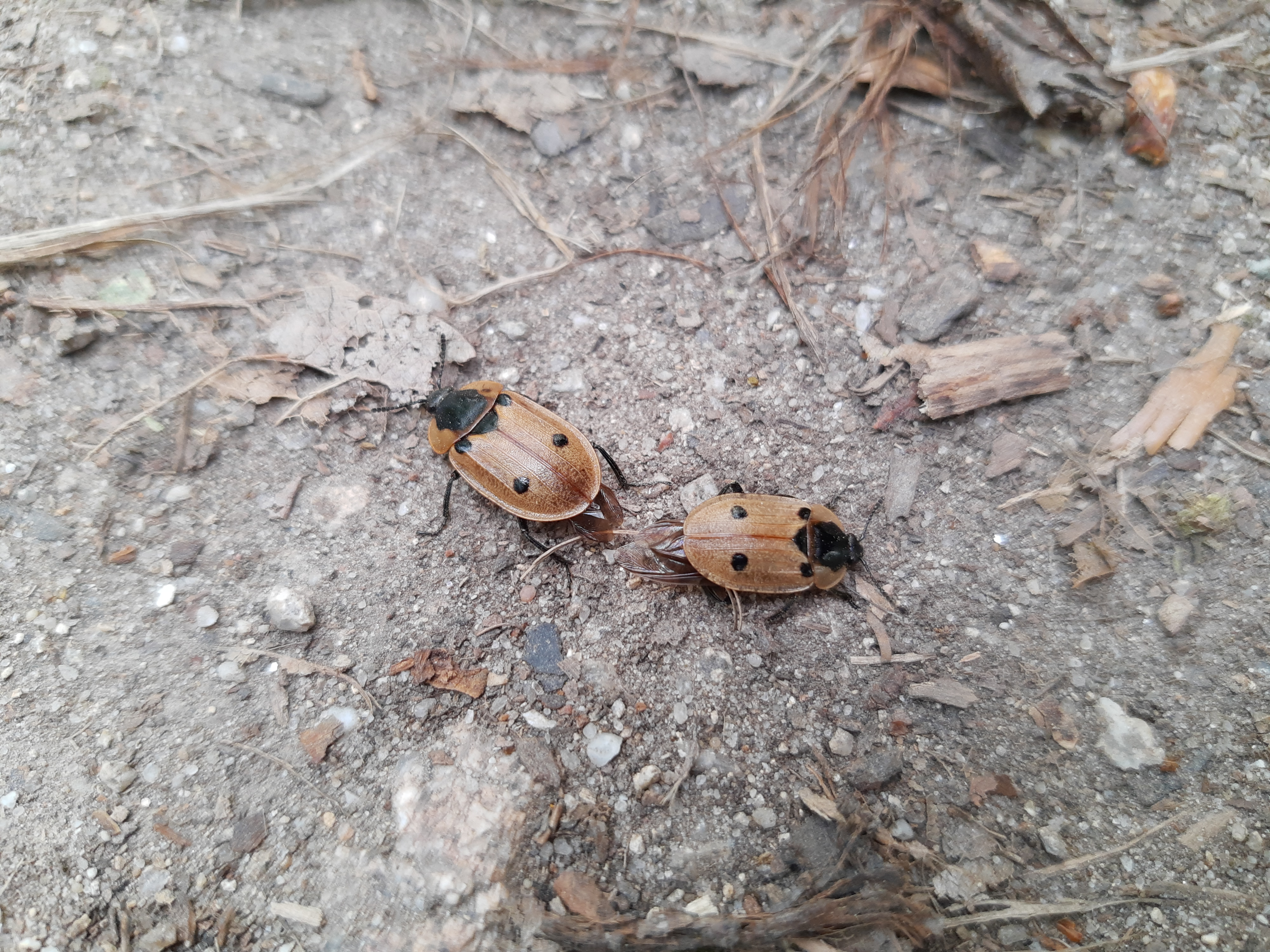 Zdochlinár štvorbodkový v Sitinskom lese, Bratislava